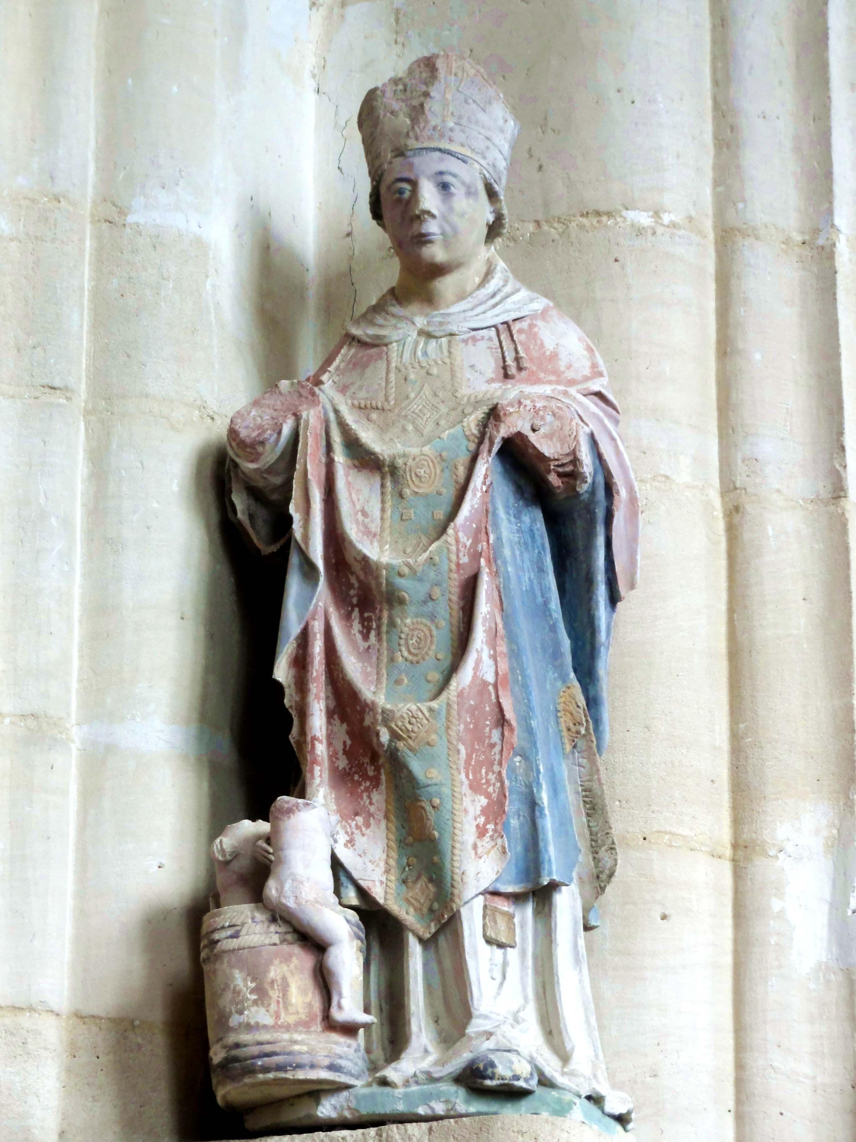 Mobilier de l'église - voir le titre du fichier.